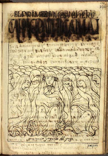 Camay Quilla